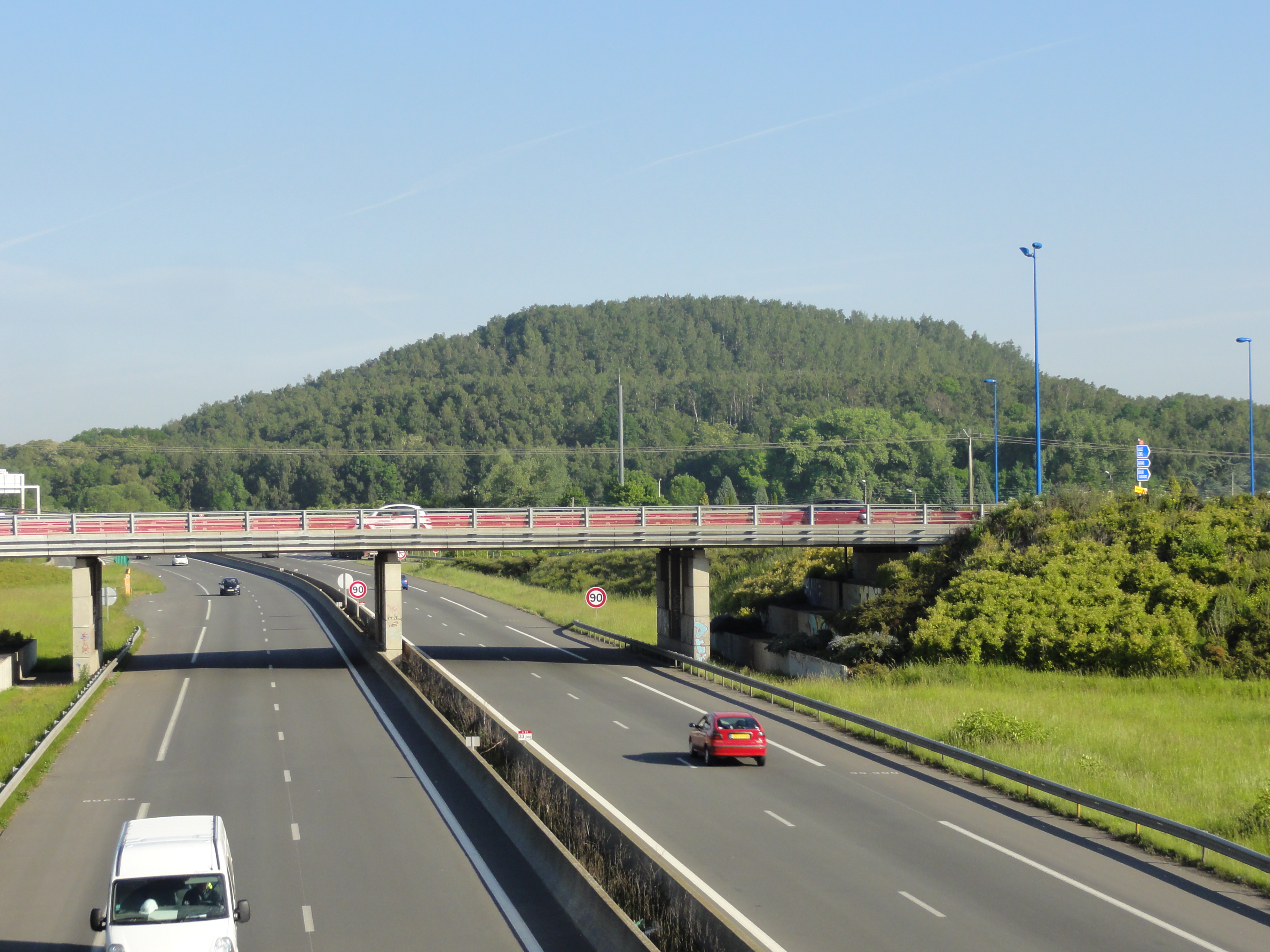 Terrils n° 123 et 141 respectivement dénommés Escarpelle ancien plat et 1 Nouveau Est, Fosse n° 1 de la Compagnie des mines de l'Escarpelle, Roost-Warendin, Nord, Nord-Pas-de-Calais, France. Le terril conique n° 141 a été créé par dessus le terril plat n° 123, à ce titre, ils sont indissociables.